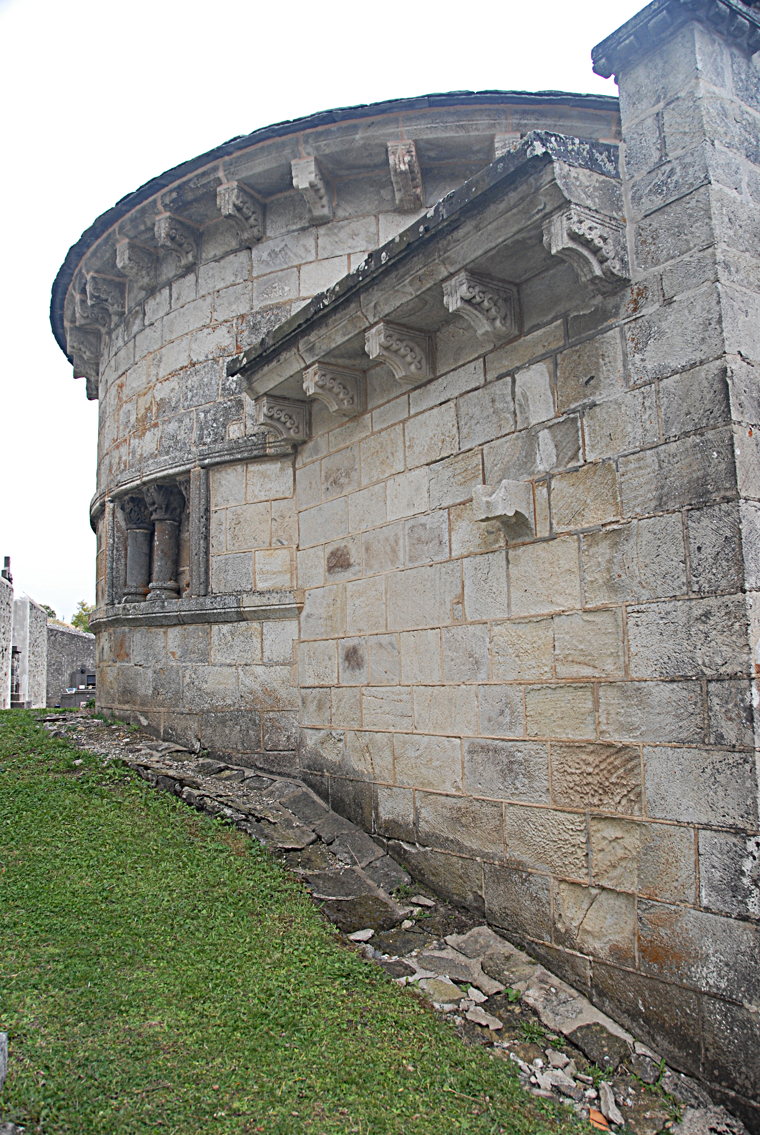 Chambon-sur-Lac, Friedhofskapelle, von NW